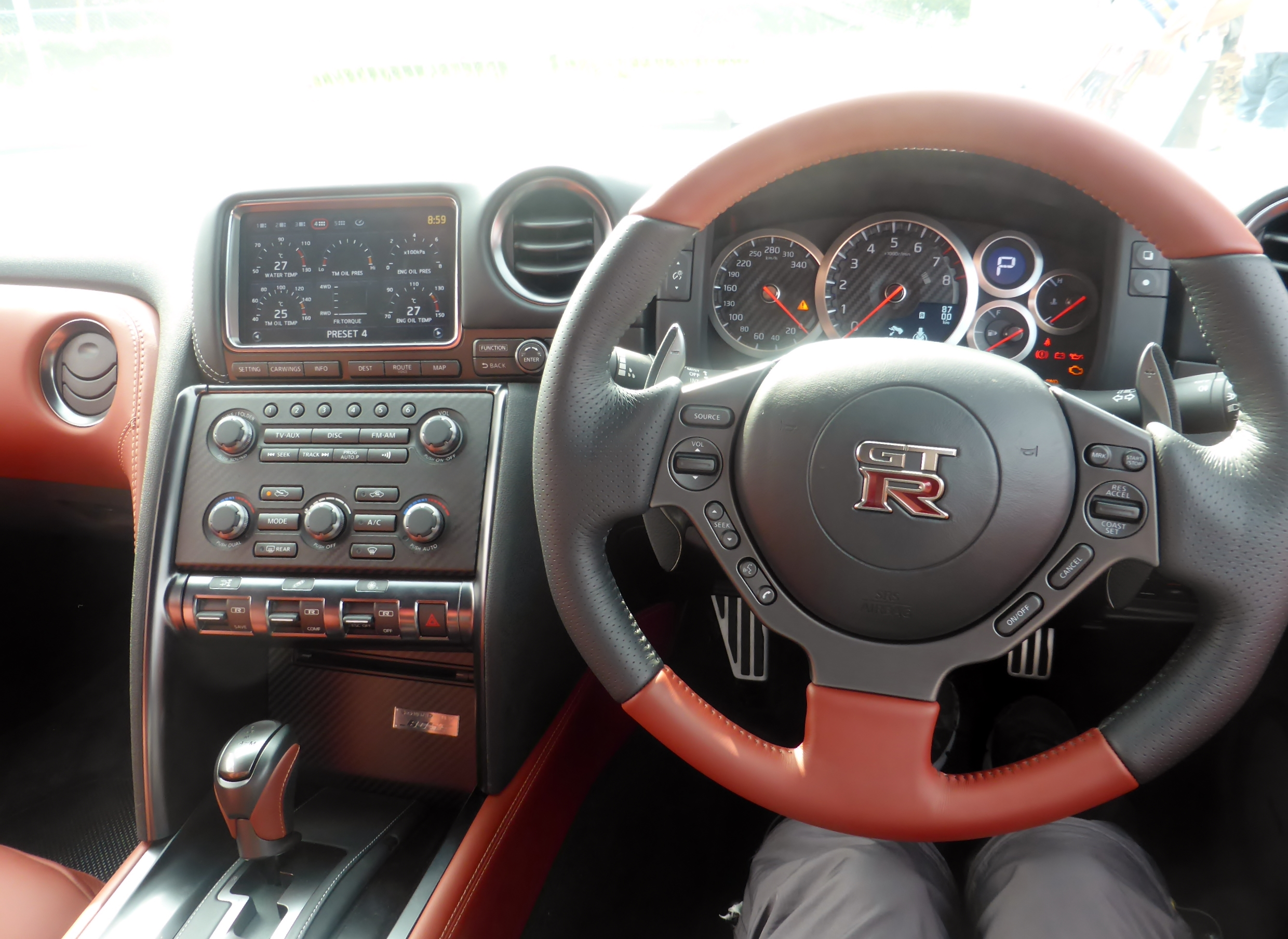 2014年型日産・GT-Rのインテリアを撮影。